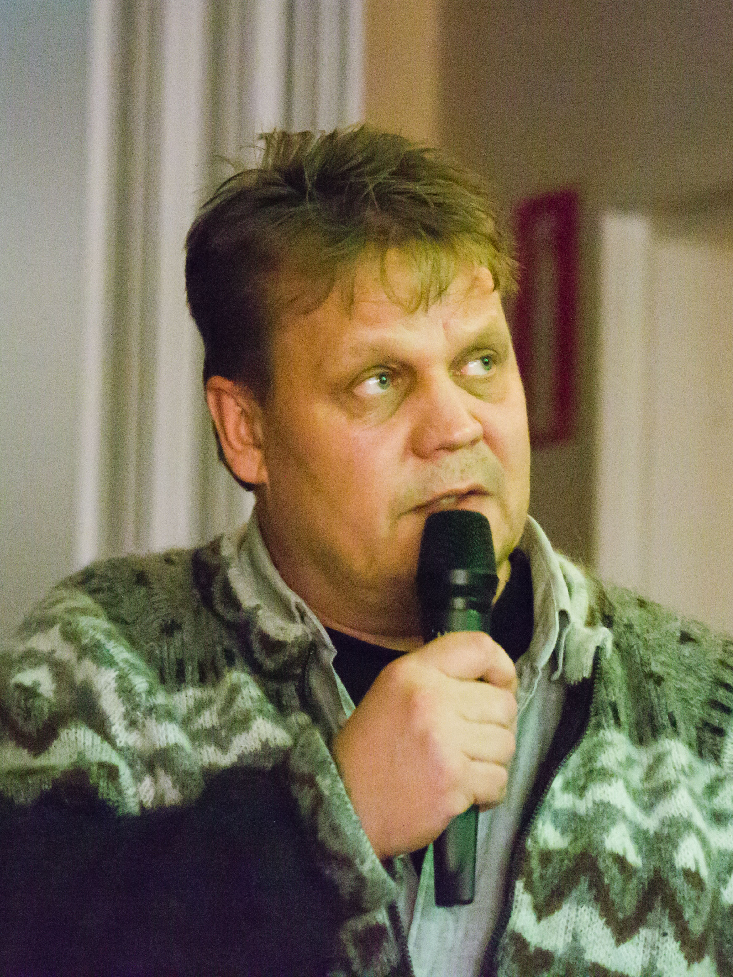 Kai Fagerström, suomalainen valokuvaaja ja kirjailija